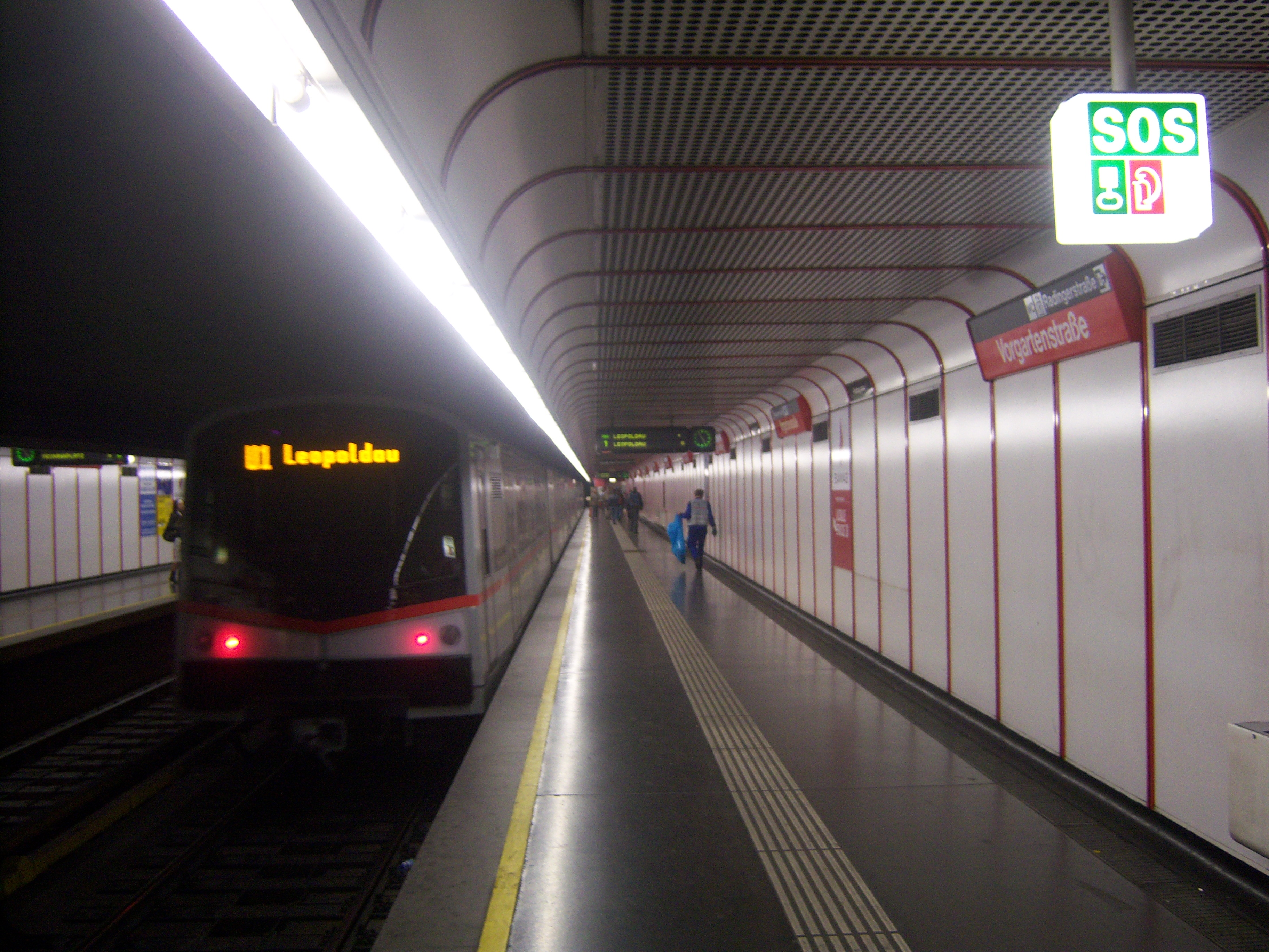 U1-Station Vorgartenstraße